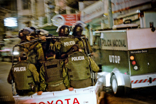 bolivia police force la paz